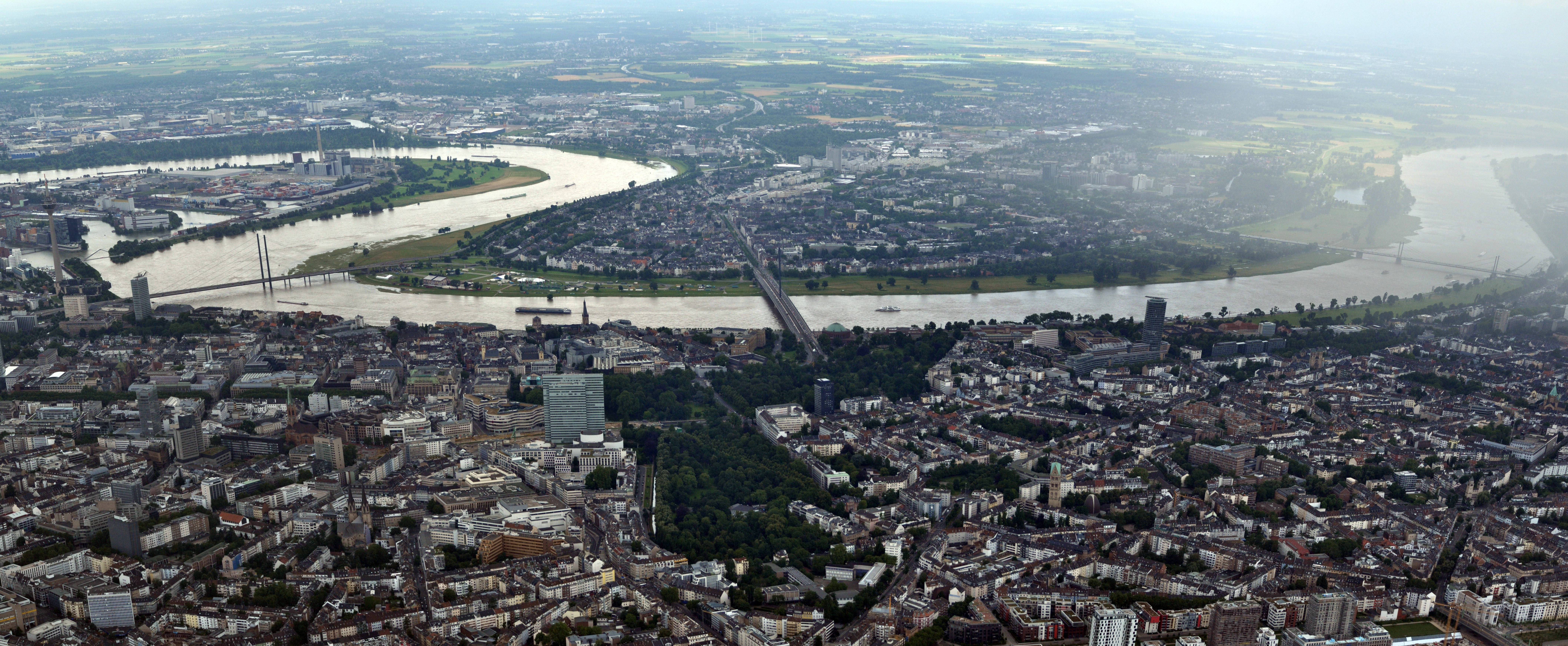 Panoramaaufnahme von Düsseldorf. 2016 Aufgenommen aus ca. 600m Höhe über Grund. Sicht nach Westen.